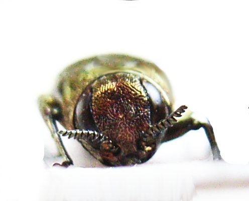 Front of Agrilus viridis